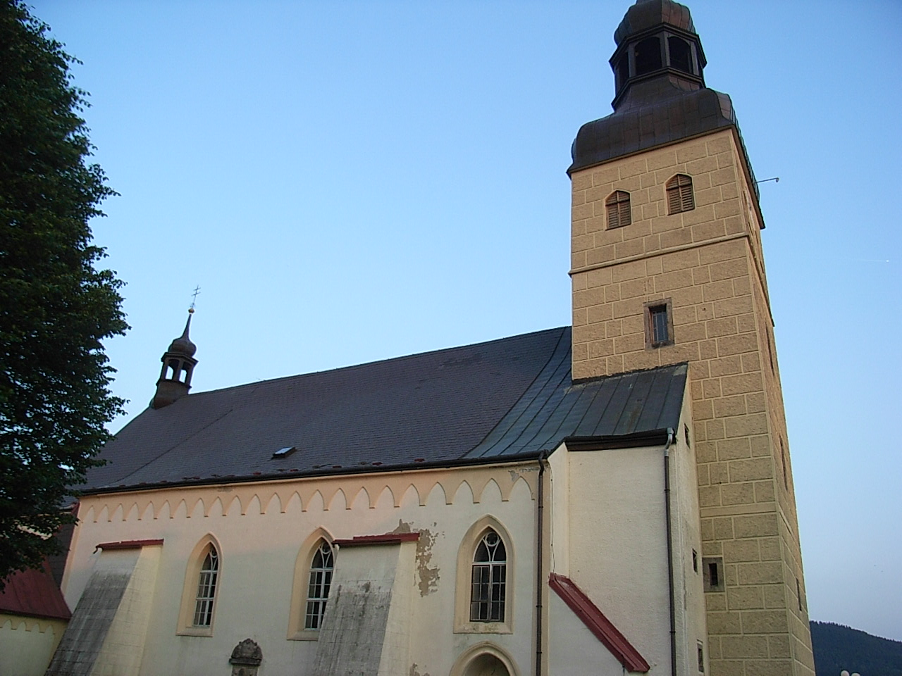 Chřibská, kostel sv. Jiří